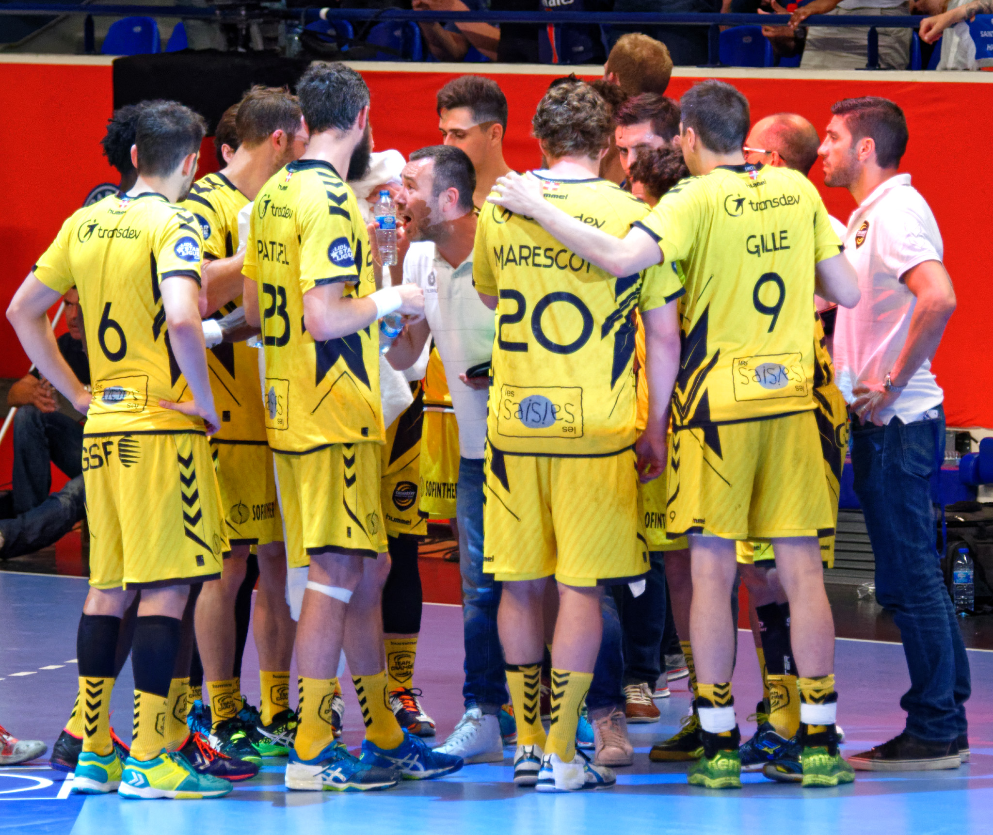 Match de la dernière journée du championnat 2017-18. PSG contre Chambéry. A Coubertin, le 31 mai 2018.